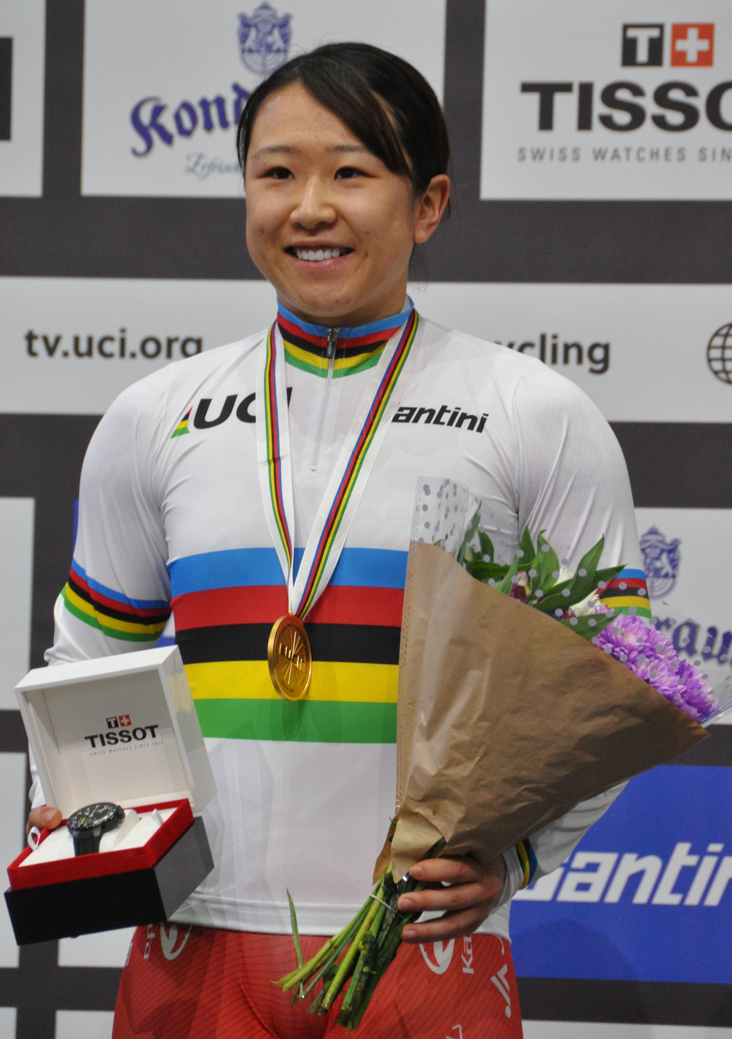 Yūmi Kajihara, japanische Radsportlerin - Weltmeisterin 2020 im Omnium